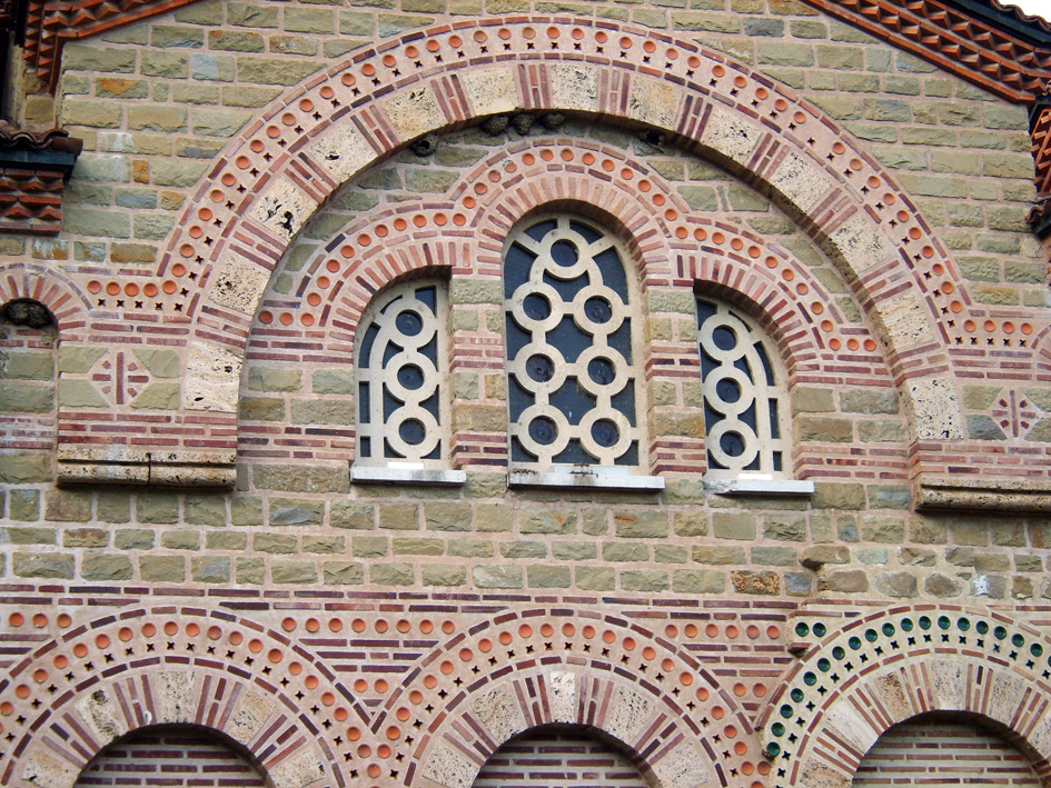 Детайл от декоративната украса на църквата "Свети Димитър Солунски", Търново, 13 век